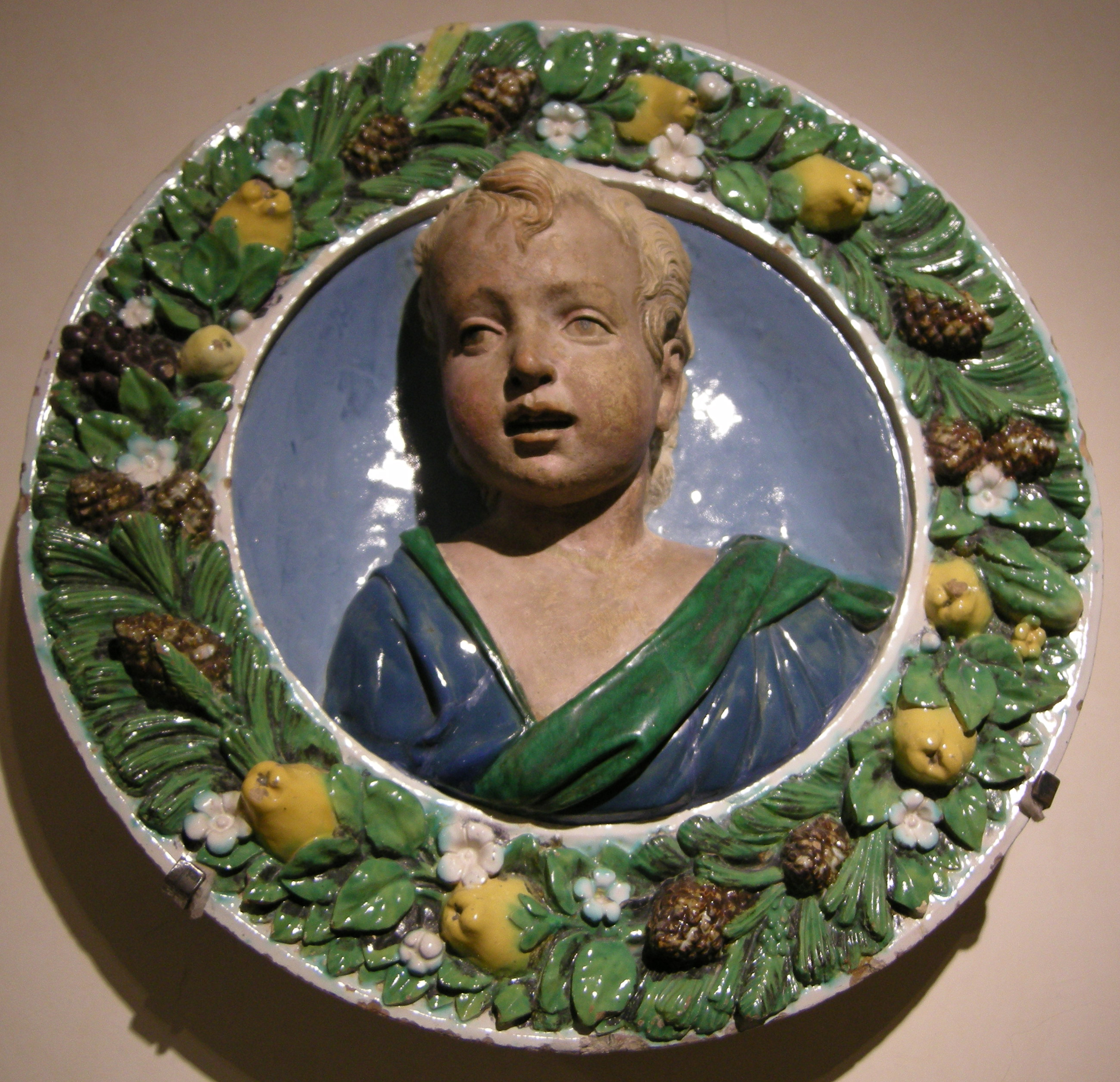 Luca della robbia il giovane, effige ideale di fanciullo, detto san giovannino, 1500-1510